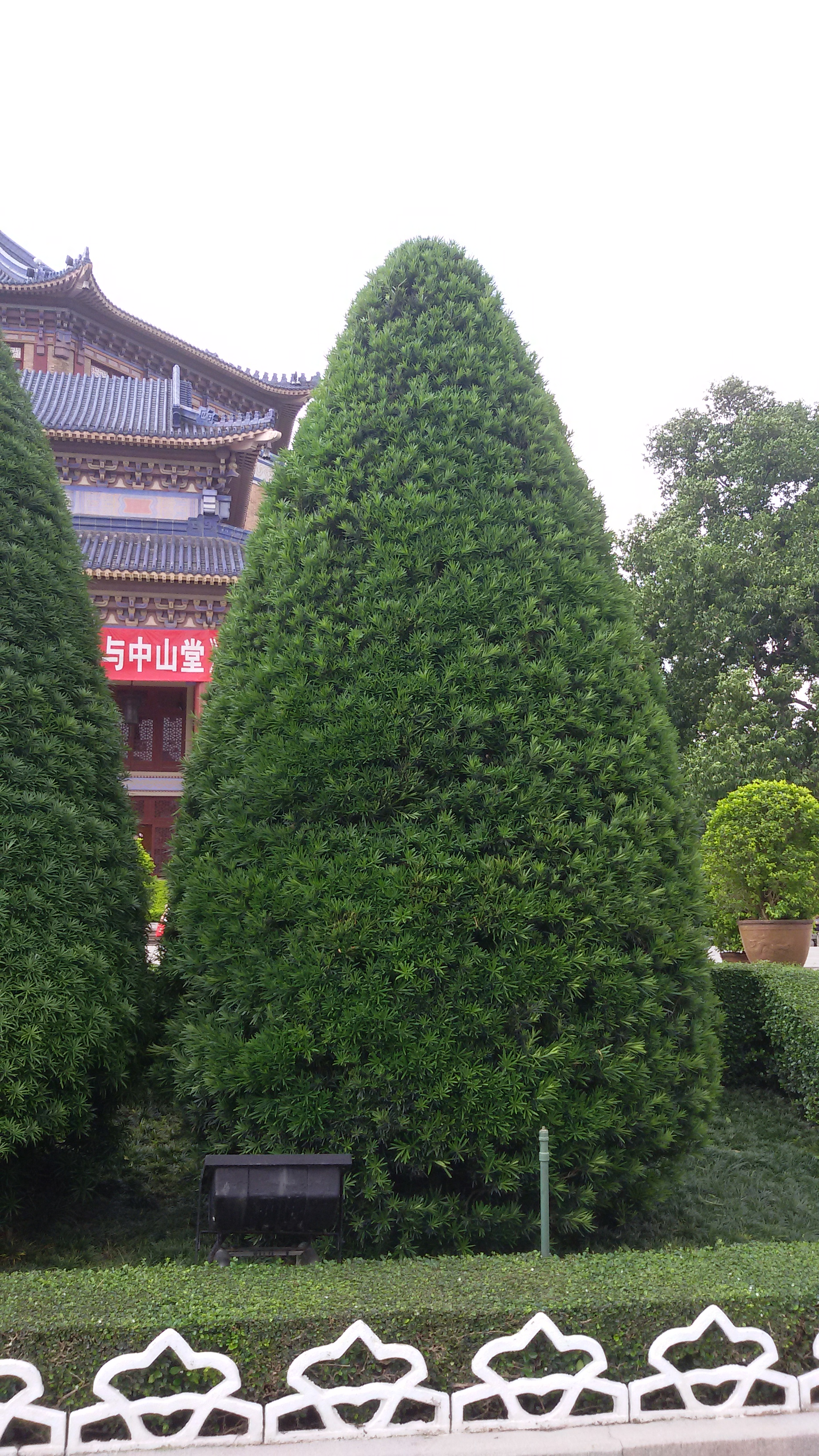 粵語: 喺廣州中山紀念堂入面種嘅圓柏